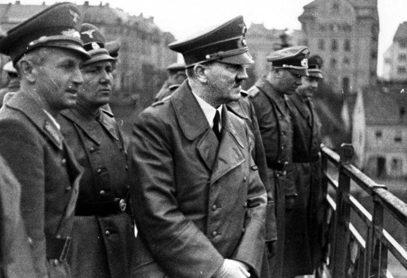 Z namenom dokumentiranja so pri nemškem Zveznem arhivu pogosto ohranili izvorne napise k slikam, ki so lahko napačni, pristranski, zastareli ali politično skrajni. v. links: Uiberreither, Bormann, A. Hitler, Dr. Dietrich (Reichspressechef) 1941